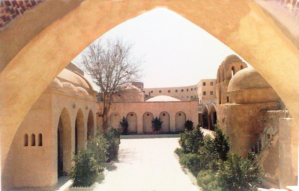 البوابة الأثرية تظهر ثلاثة من كنائس الدير دون الحصن.